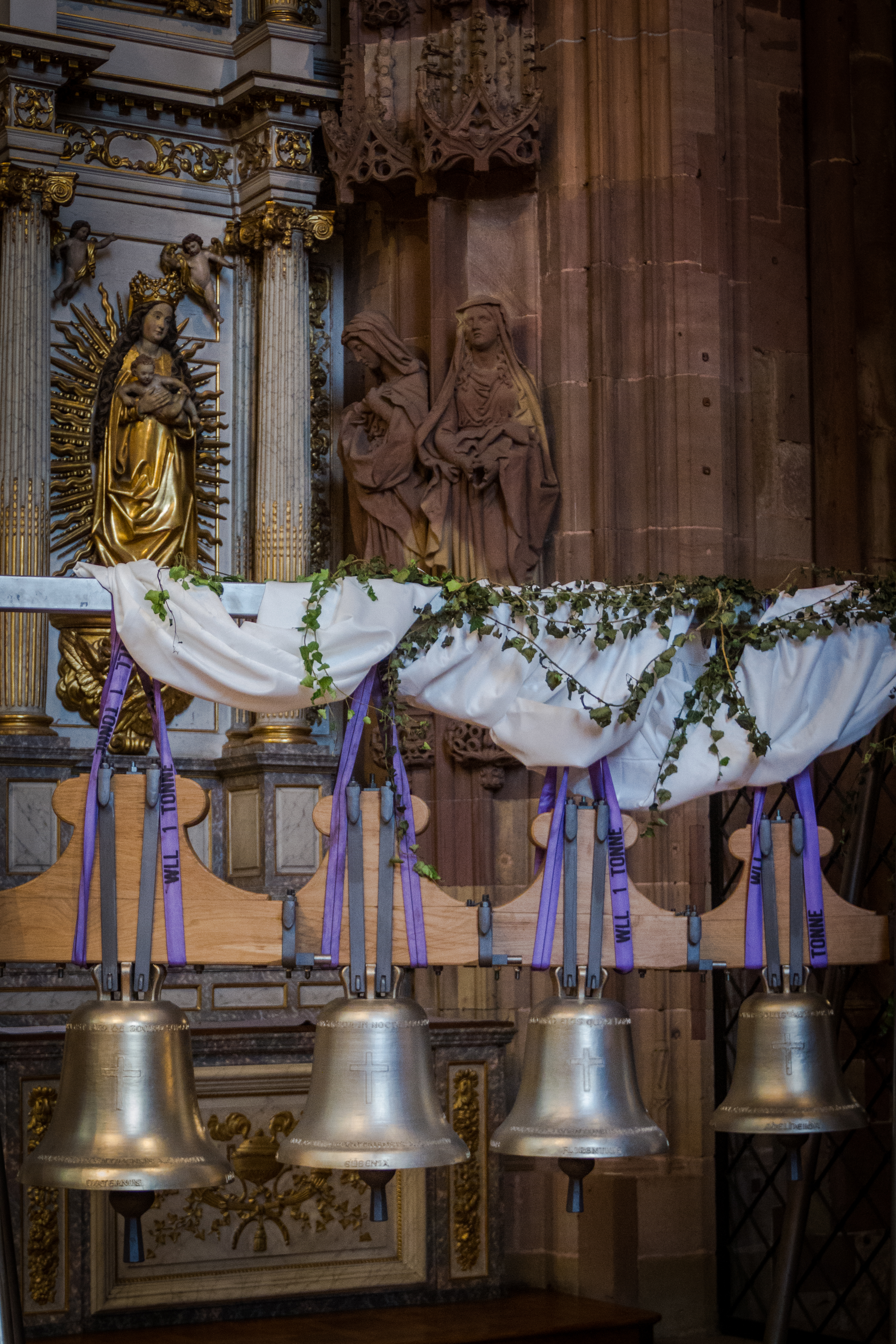 Cathédrale Notre-Dame de Strasbourg cloches du millénaire août 2014